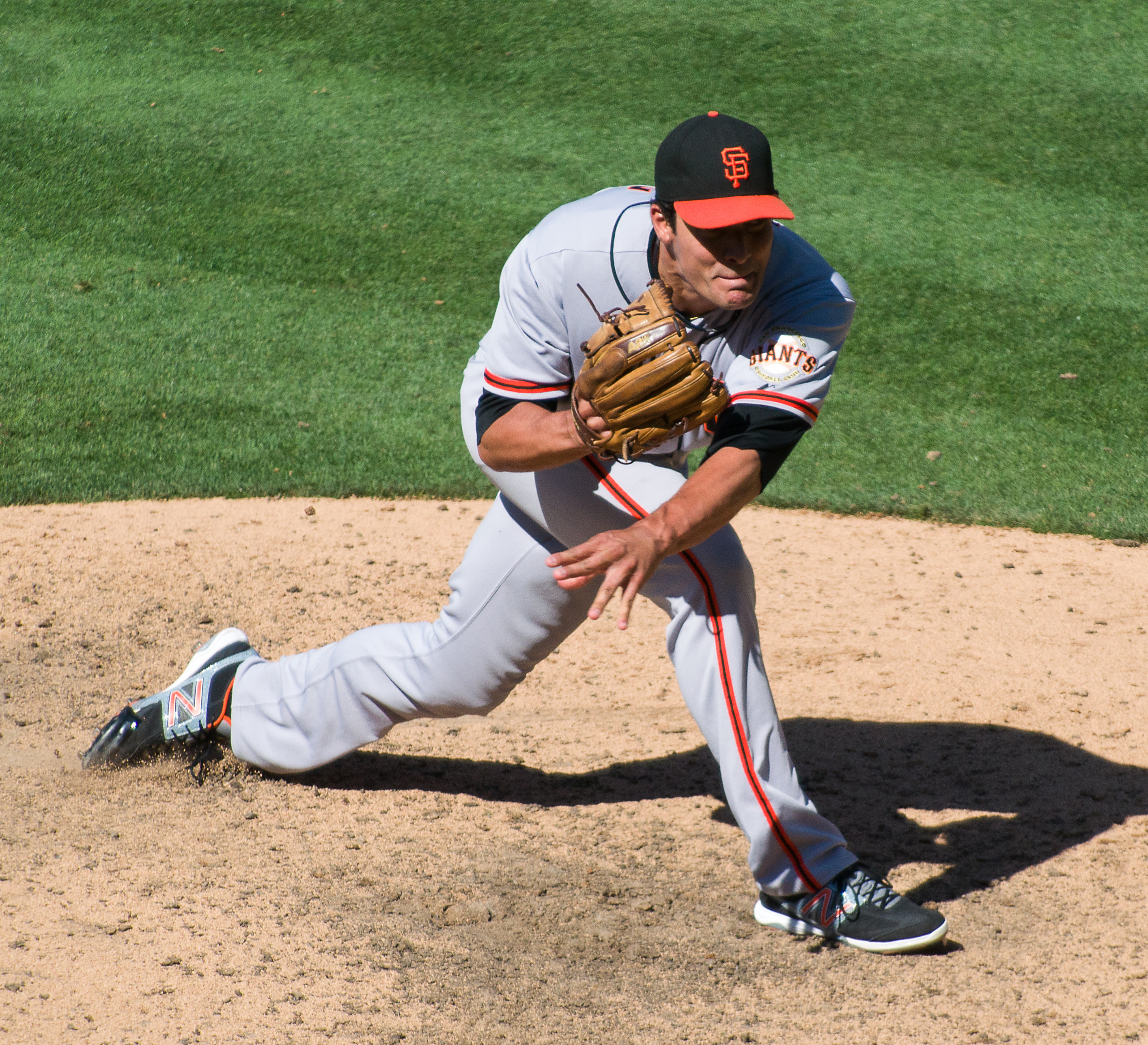 Javier López